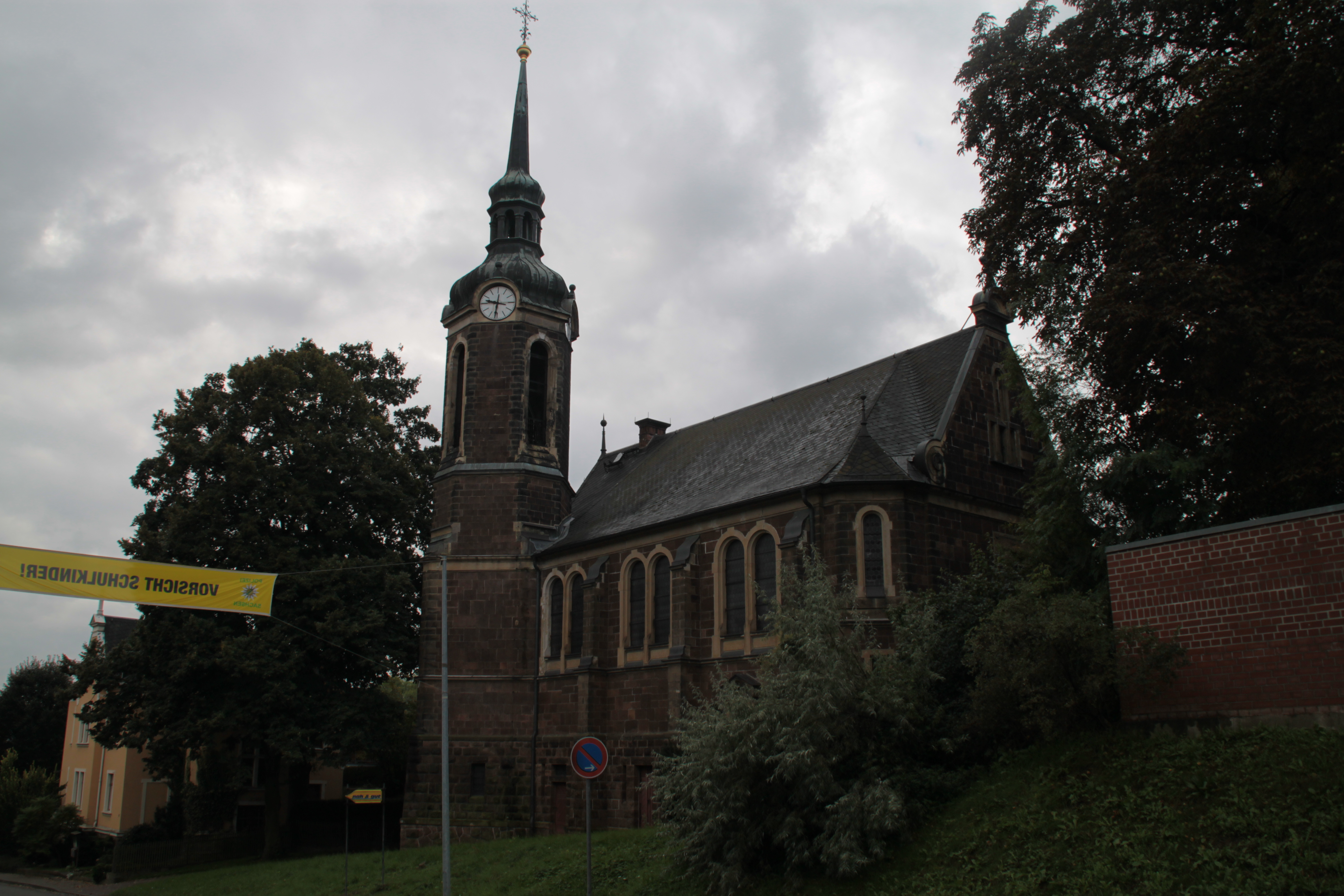 Trinitatiskirche Ostrau, erbaut 1903